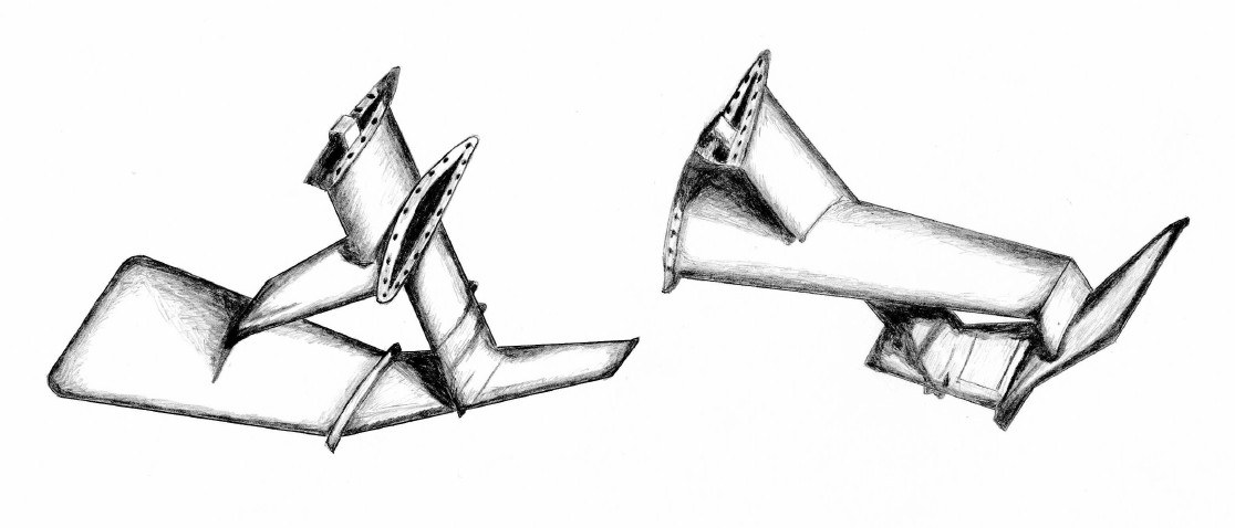 Носовые крылья малого противолодочного корабля проекта 1141